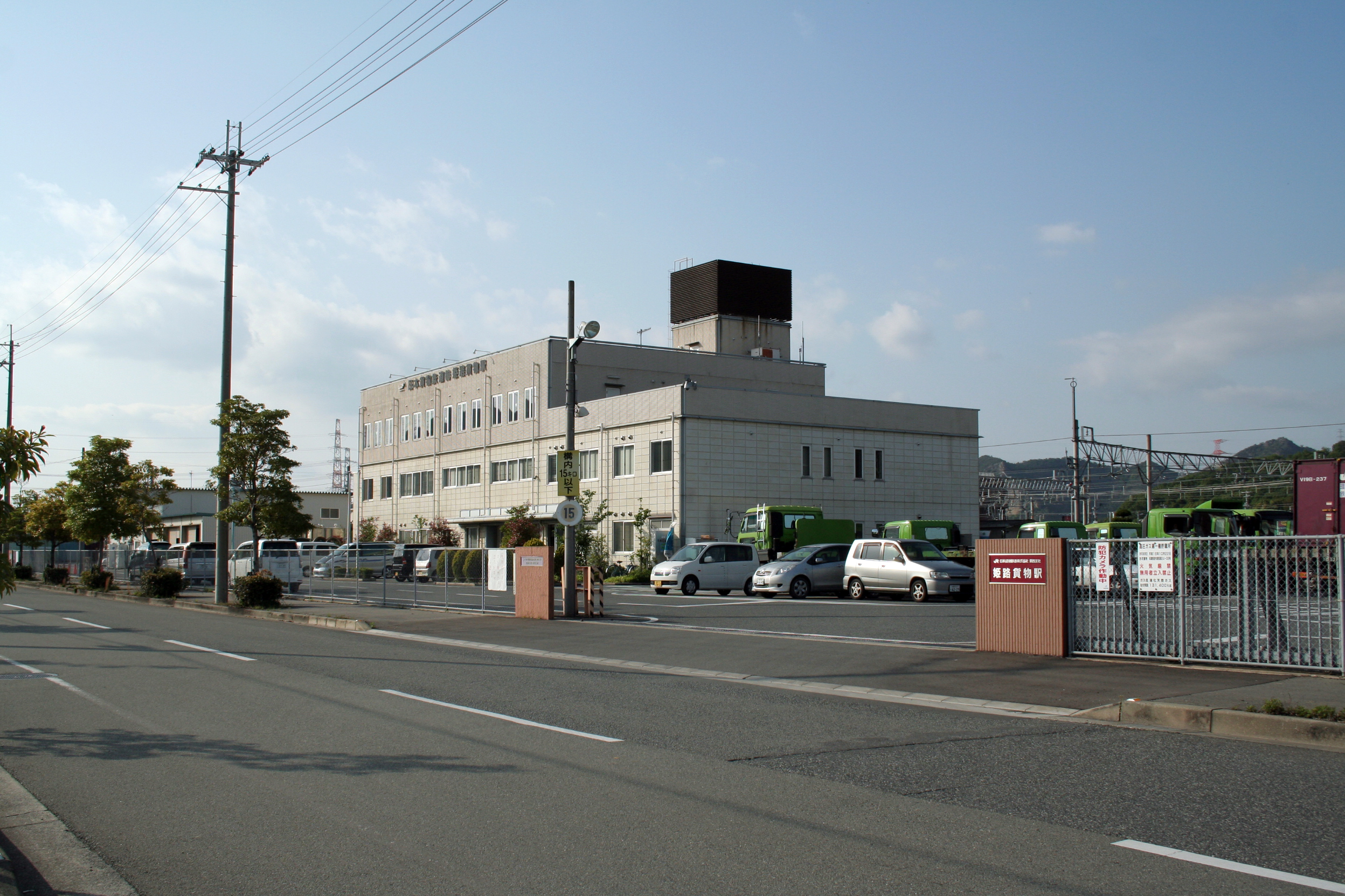 姫路貨物駅。 貨物駅の建物と出入り口。